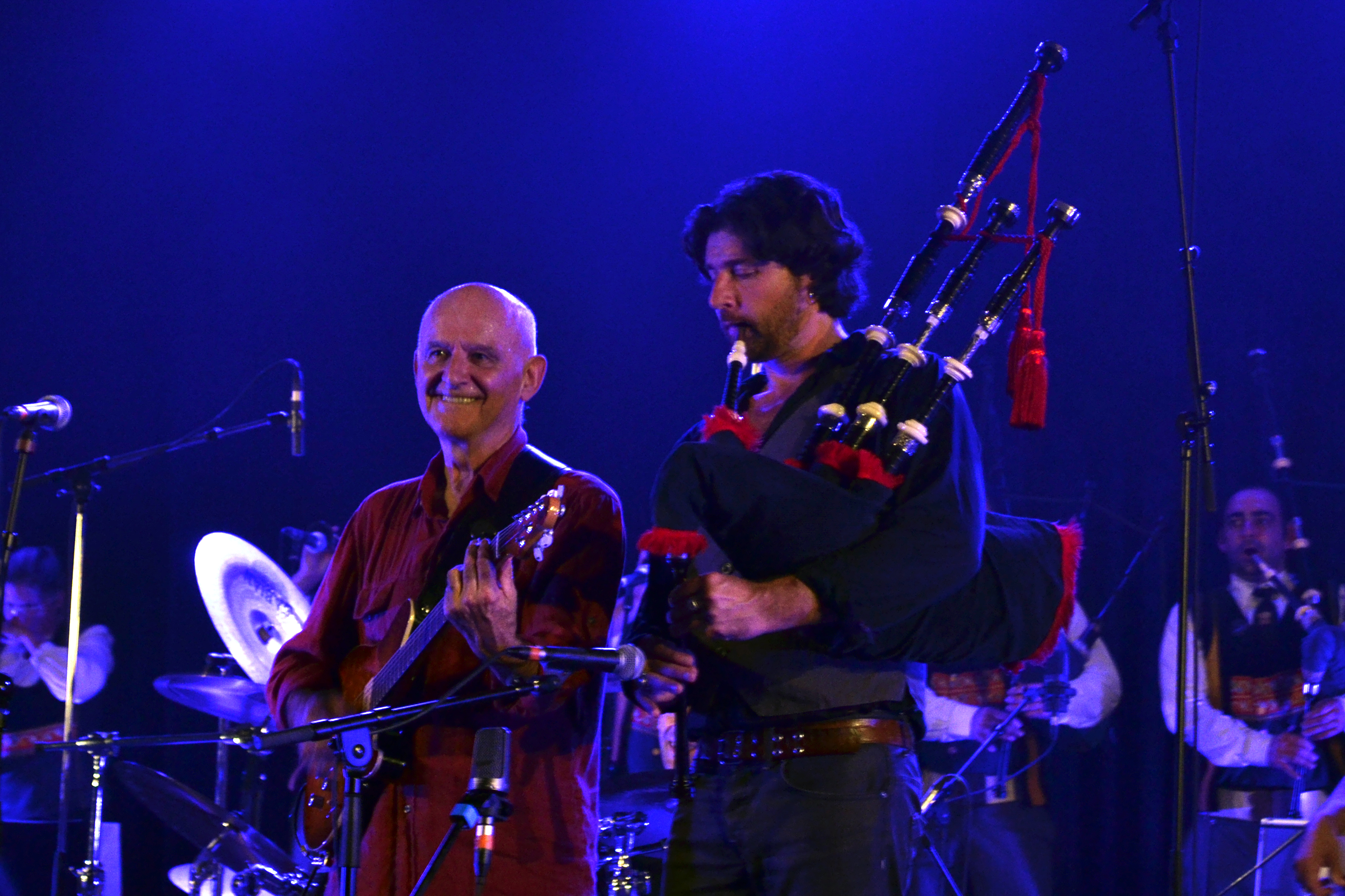 Spectacle Célébration de Dan Ar Braz (Ronan Le Bars à la cornemuse) à l'occasion de la Jap'Noz à Plouider le 17 août 2013.